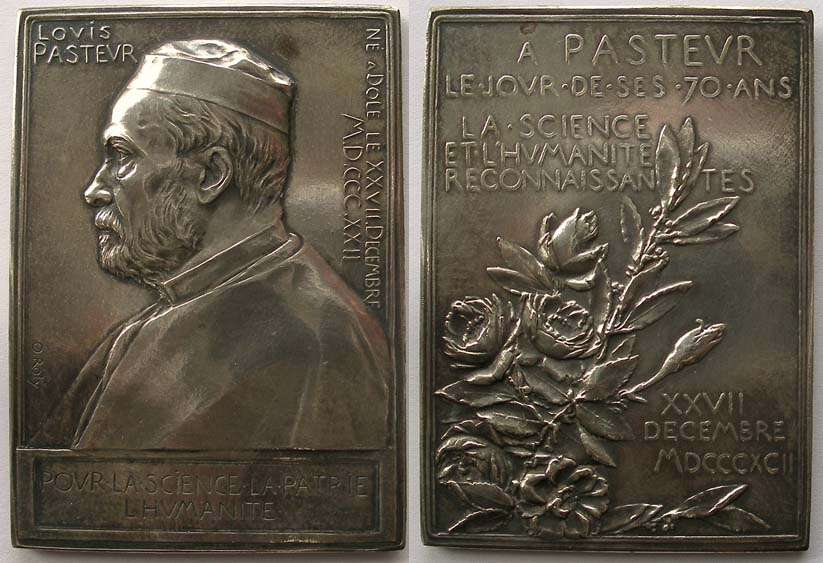 Médaille réalisée en 1892 par Oscar Roty par souscription nationale et offerte à Louis Pasteur à l'occasion du jubilé de ses 70 ans par le président Sadi Carnot à la Sorbonne..